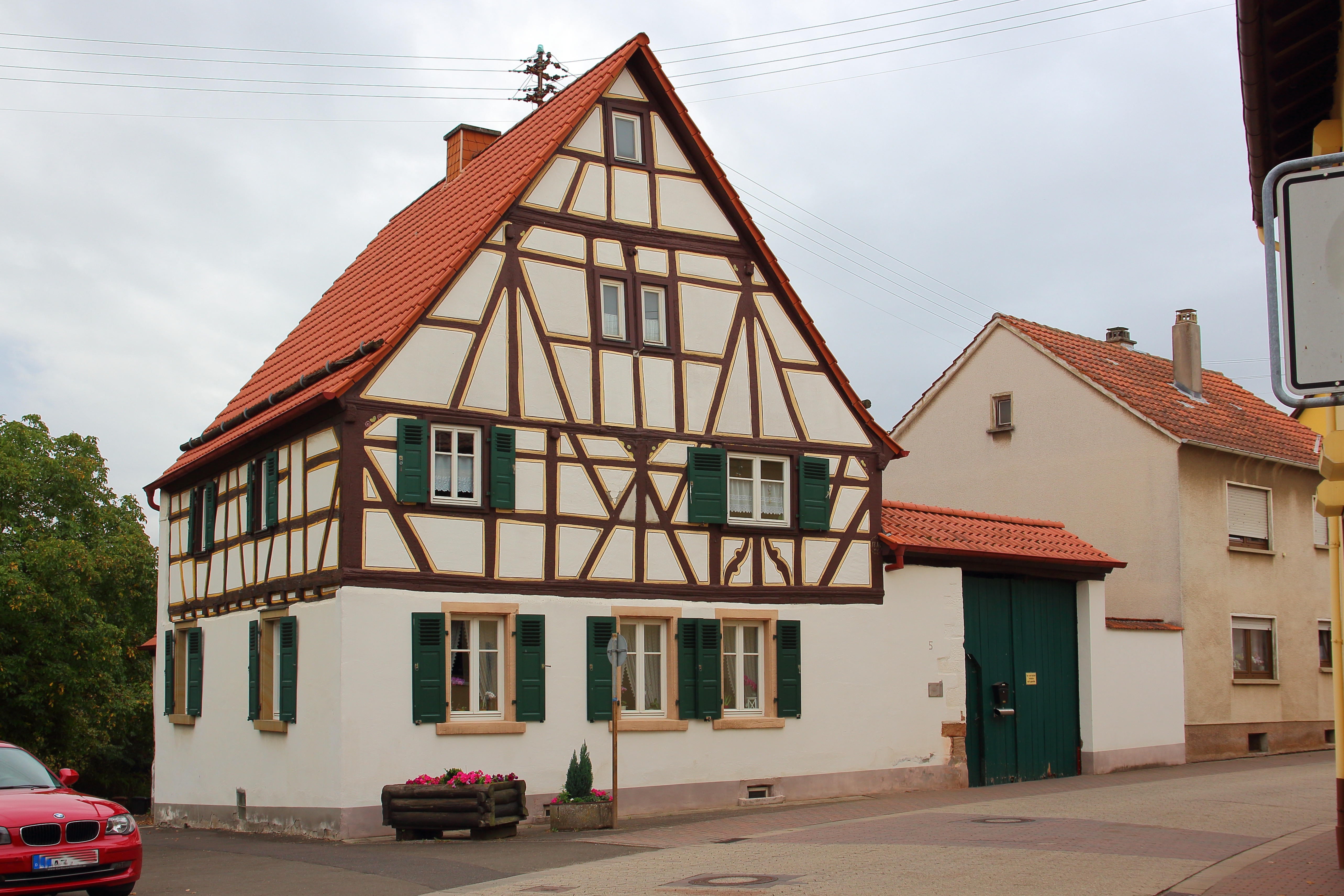 Barockes Wohnhaus mit Fachwerk, 67294 Orbis